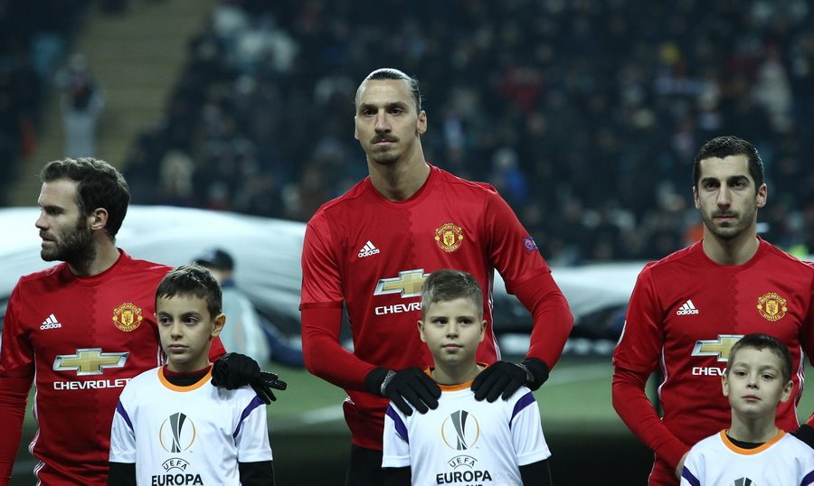 Juan Mata, Zlatan Ibrahimović, Henrikh Mkhitaryan during Europa League clash against Zorya Lugansk on 8 December 2016